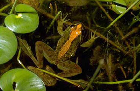 Podonectes minutus